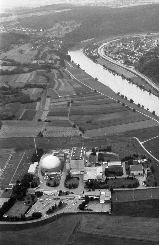 Rhein-Bodensee-Bereisung des Rates von Sachverständigen für Umweltfragen und des Bundesministeriums des Inneren.